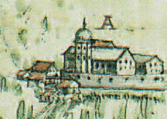 Der Ausschnitt aus der ältesten bekannten Karte des Kordigastes, die anlässlich eines strittigen Schaftriebes bei Giechkröttendorf erstellt wurde, zeigt eine relativ detailgeträue Ansicht des Giechkröttendorfer Schlosses.